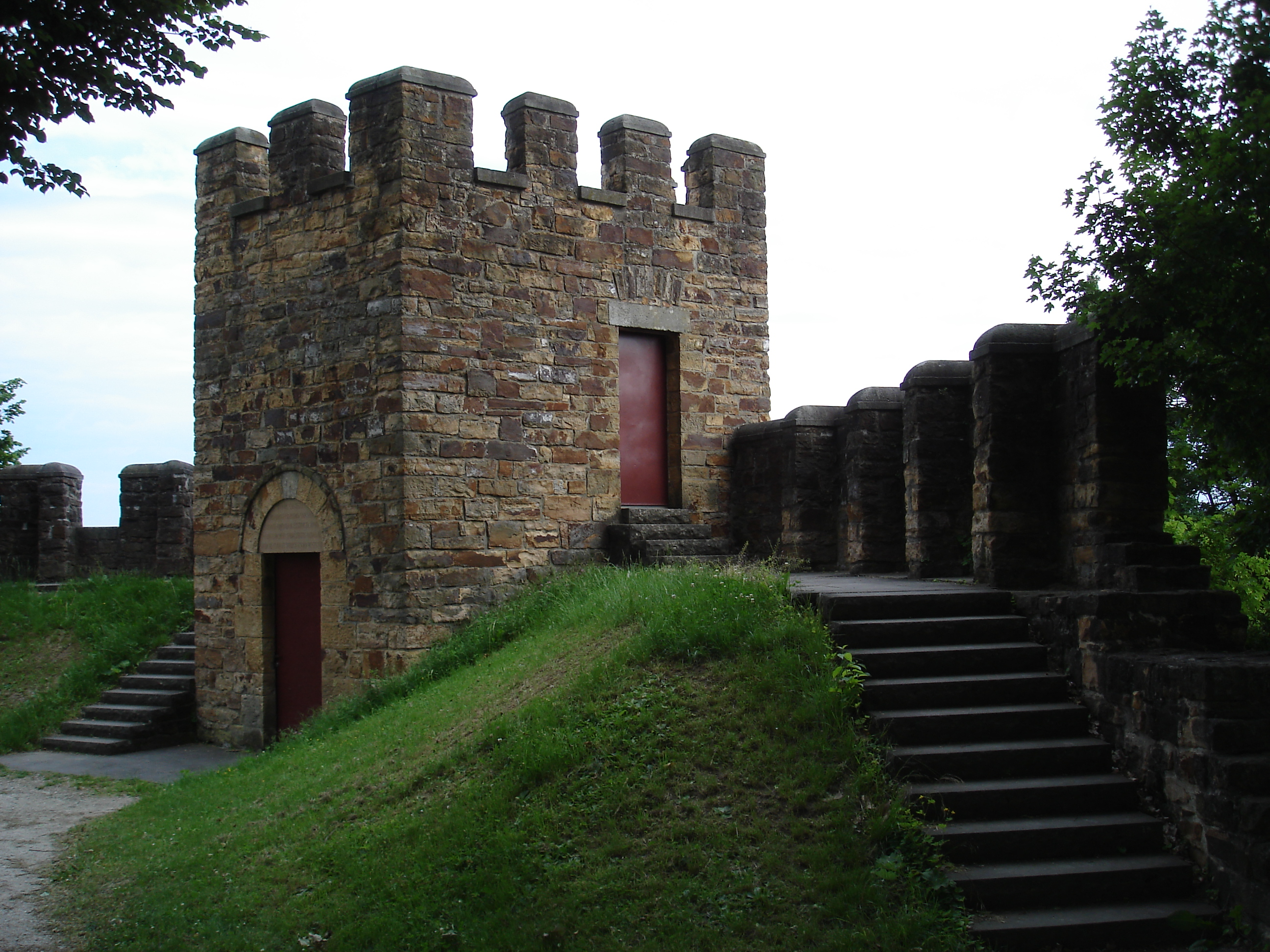 Rekonstruierter Turm des Kastells Köngen